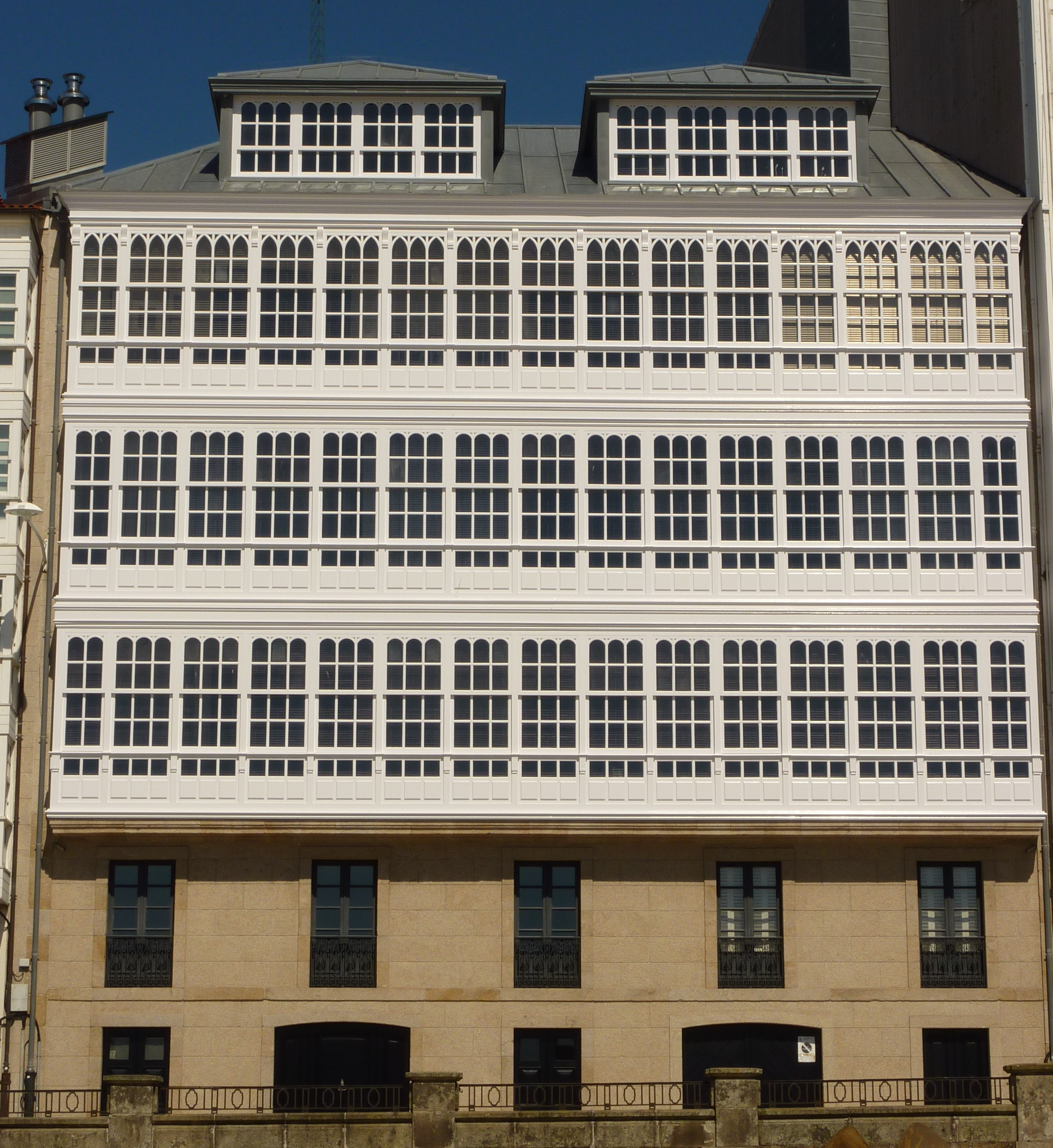 House in Coruña José María Bermúdez de Castro